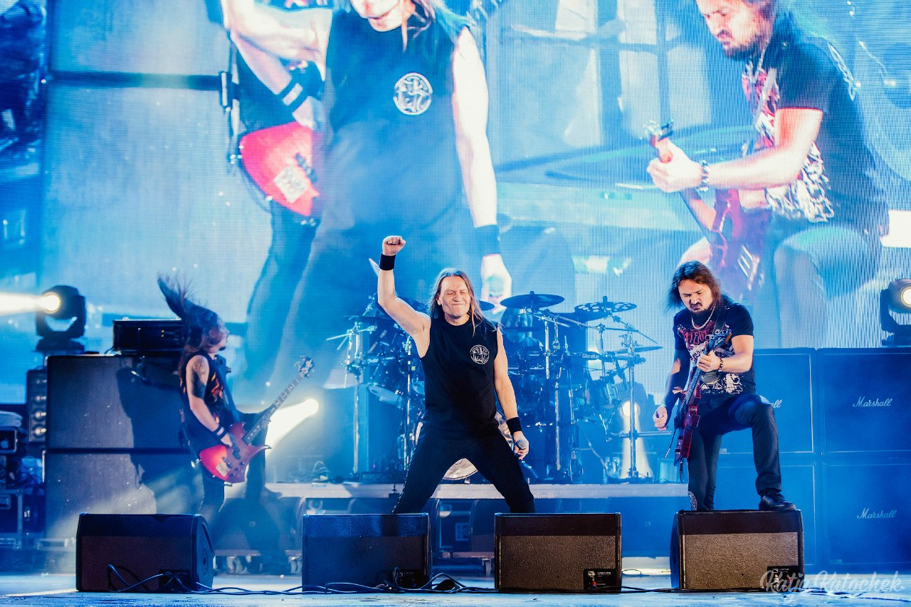 Группа Кипелов на фестивале Moscow Metal Meeting 30.08.2014